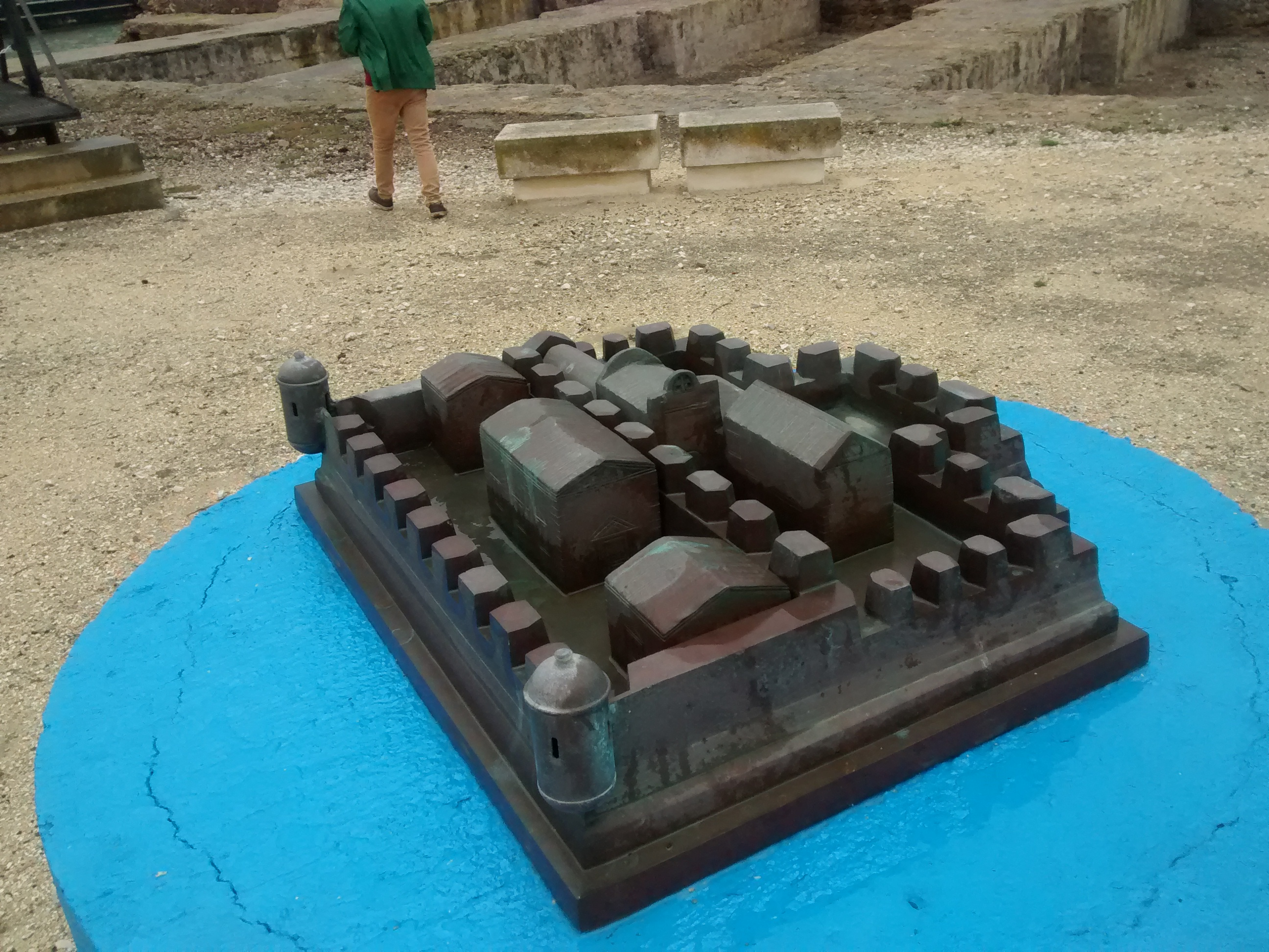 Maqueta del Castillo de Matagorda en Puerto Real, España